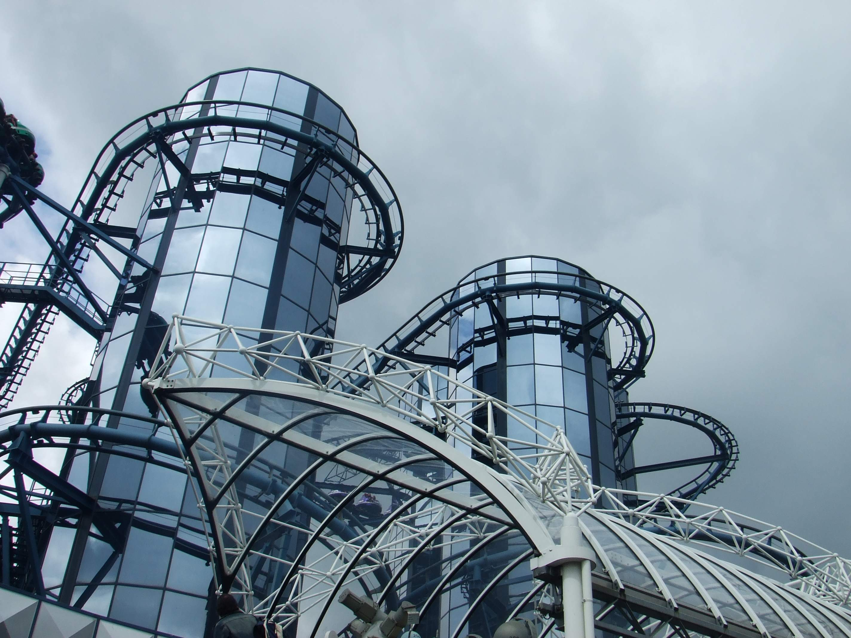 Euro-Mir à Europa-Park à Rust (Allemagne).